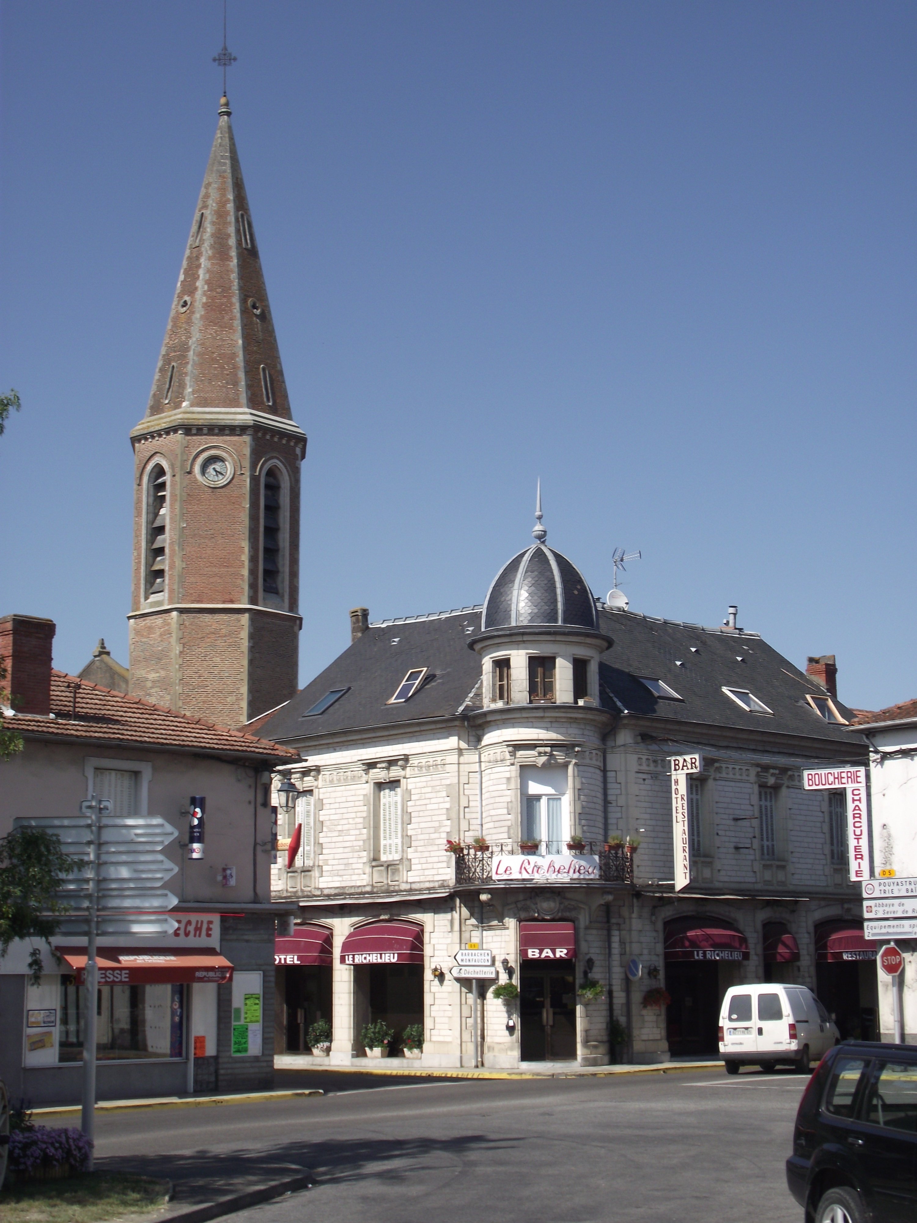 Clocher de l'église Saint-Louis et hôtel Le Richelieu à Rabastens-de-Bigorre (Hautes-Pyrénées, France).